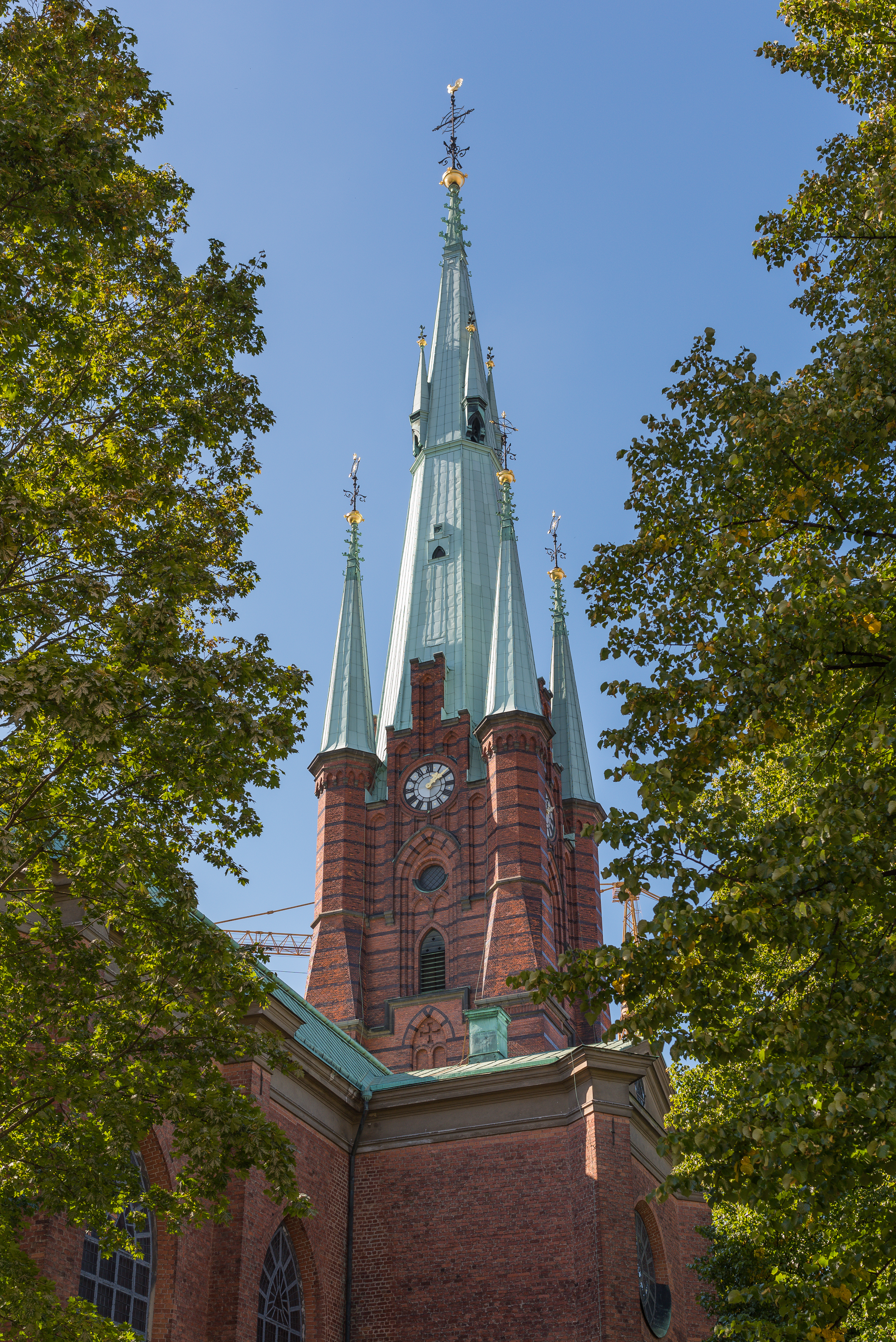 Stockholm September 2014